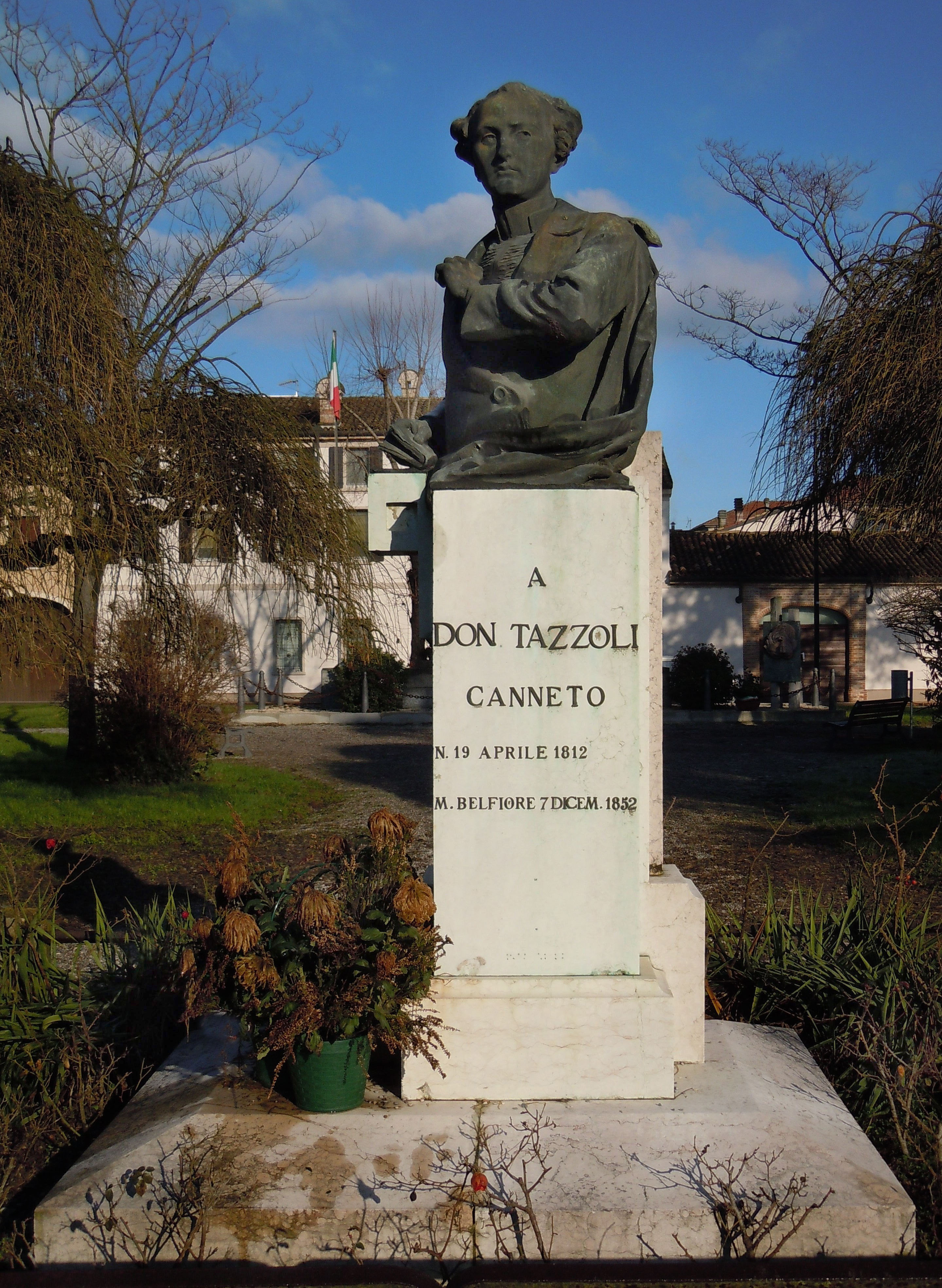 Canneo sull'Oglio, monumento a don Enrico Tazzoli